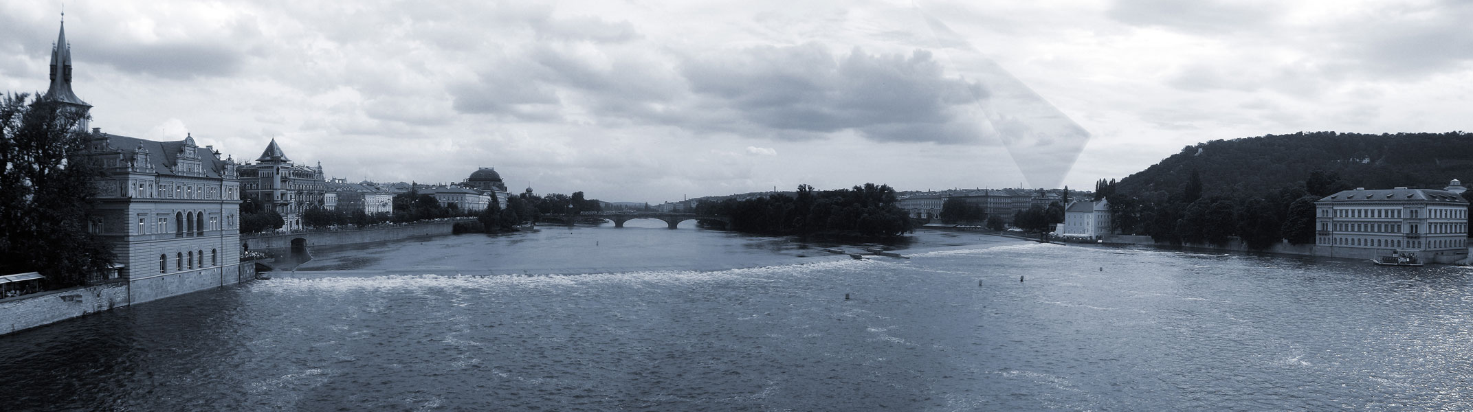 Panoráma Vltavy z Karlova mostu